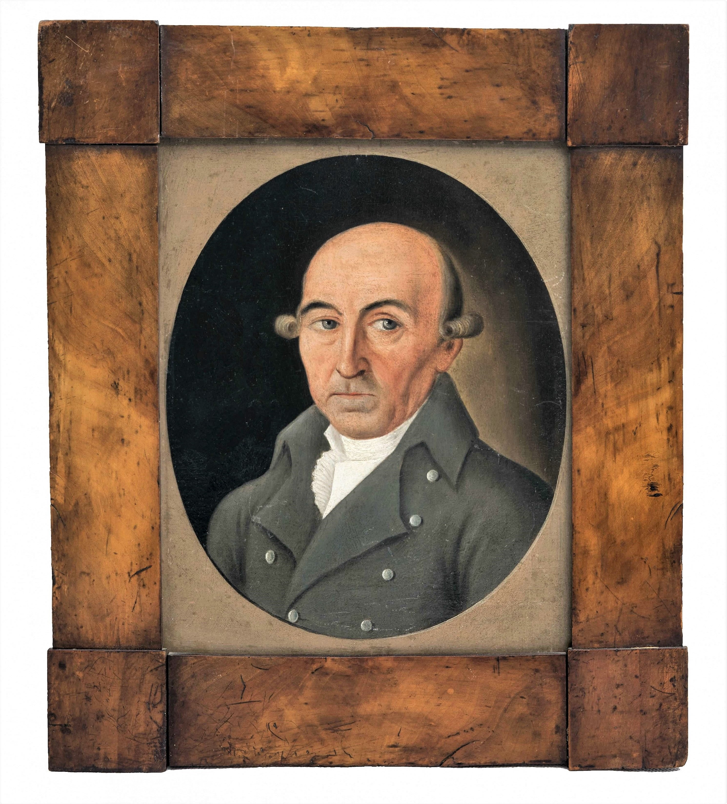 Porträt des Elseyer Stiftspredigers, Heimatforschers und Politikers Johann Friedrich Möller (1750–1807), aus dem Besitz des früheren Stiftsamtmannes Friedrich Moritz Holtschmit. Öl auf Papier und Holz, unbekannter Künstler, um 1800. – Herkunft/Rechte: Stadtmuseum Hagen / Heike Wippermann (RR-R), Fotograf Ralf Blank. [1]